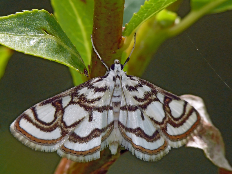 Lūgninis ugniukas (Nymphula stagnata). Rastas Akmenės kolektyviniuose soduose